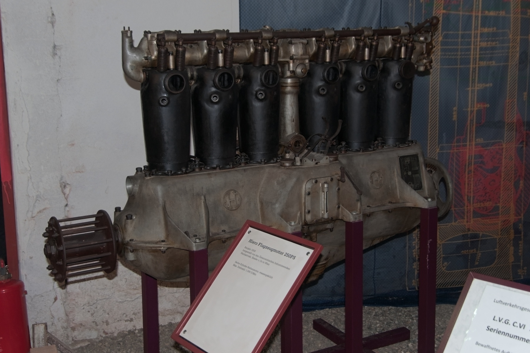 Hiero N aircraft engine